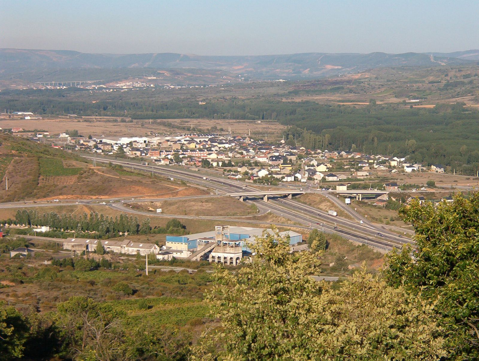 Almázcara y la Autovía del Noroeste. (Hay otras localizaciones marcadas con notas).